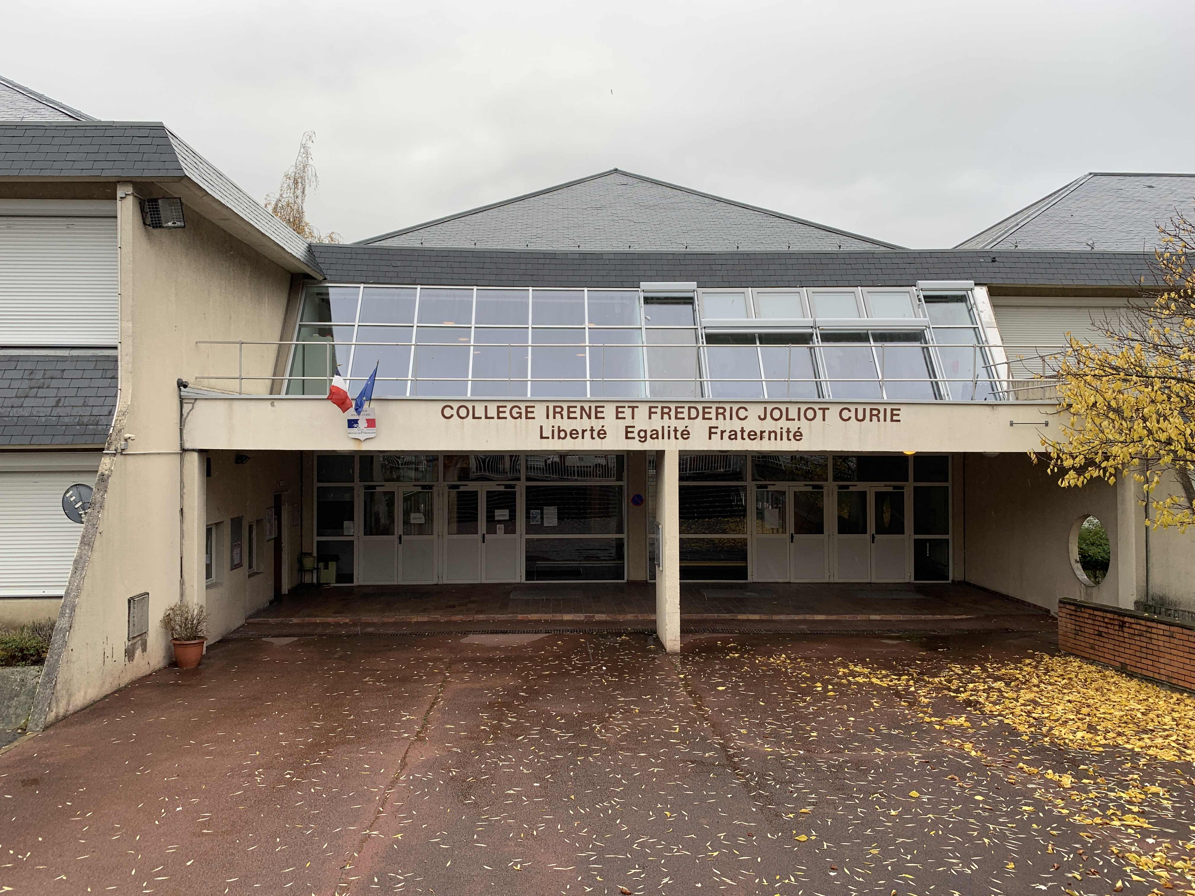 Collège Frédéric et Irène Jolliot-Curie de Fontenay-sous-Bois.